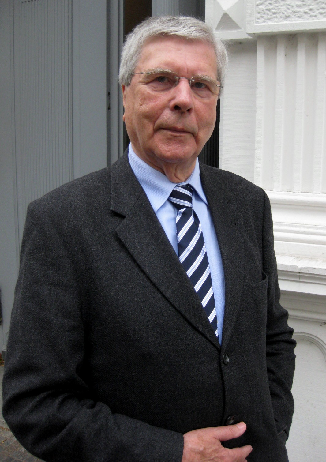 Robert Knüppel am Eingang des Buddenbrookhauses